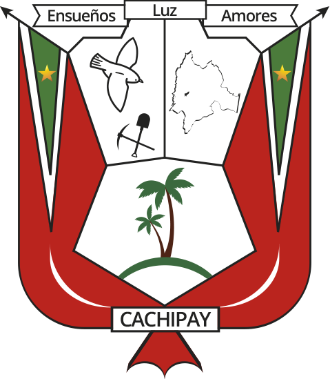 ​ FORMA: Poligono (Forma geométrica) de acuerdo a su número de lados es heptágono. DISTRIBUCION: Tres (3) cuarteles con Blasones; dividido en dos (2) cantones y un (1) cuartel inferior con su punta. CANTON DIESTRO: Cuartel 1, sobre rojo fundamental, una paloma blanca, símbolo de paz ,(colocada hacia el lado superior izquierdo del cantón) "Rastrillo y Azadón entrecruzados, símbolo de trabajo especialmente agrícola (situados hacia el lado derecho inferior del cantón diestro). CANTON SINIESTRO: Cuartel 2, sobre amarillo (fundamental)croquis del Departamento de Cundinamarca, sobre el que se ha localizado el croquis del municipio de cachipay , (obtenido por el pueblo en franca lucha cívica). Los colores que se aplican en este cantón guardan relación con los de la bandera. CANTON INFERIOR: Cuartel 3, sobre blanco (fundamental), el dibujo en una palma de Cachipay es (chontaduros), que es la planta que le ha dado el nombre aborigen (panche) al Municipio, reconocido en todo el país y aún fuera de nuestras fronteras en las notas del "pasillo Cachipay", hasta hoy no se ha podido descifrar etimológicamente. A los lados de la palma lleva algo representativo del café grano representativo del Municipio. PUNTA DEL ESCUDO: el hombre que con orgullo ostenta nuestra municipalidad :"CACHIPAY" (cinta amarilla en letras negras). EMBLEMA, en la parte superior del escudo sobre una cinta de color amarilla en letras negras las palabras: " ENSUEÑOS, LUZ , AMORES ", que serán el lema del municipio tal y como están descritas en el "Pasillo Cachipay"